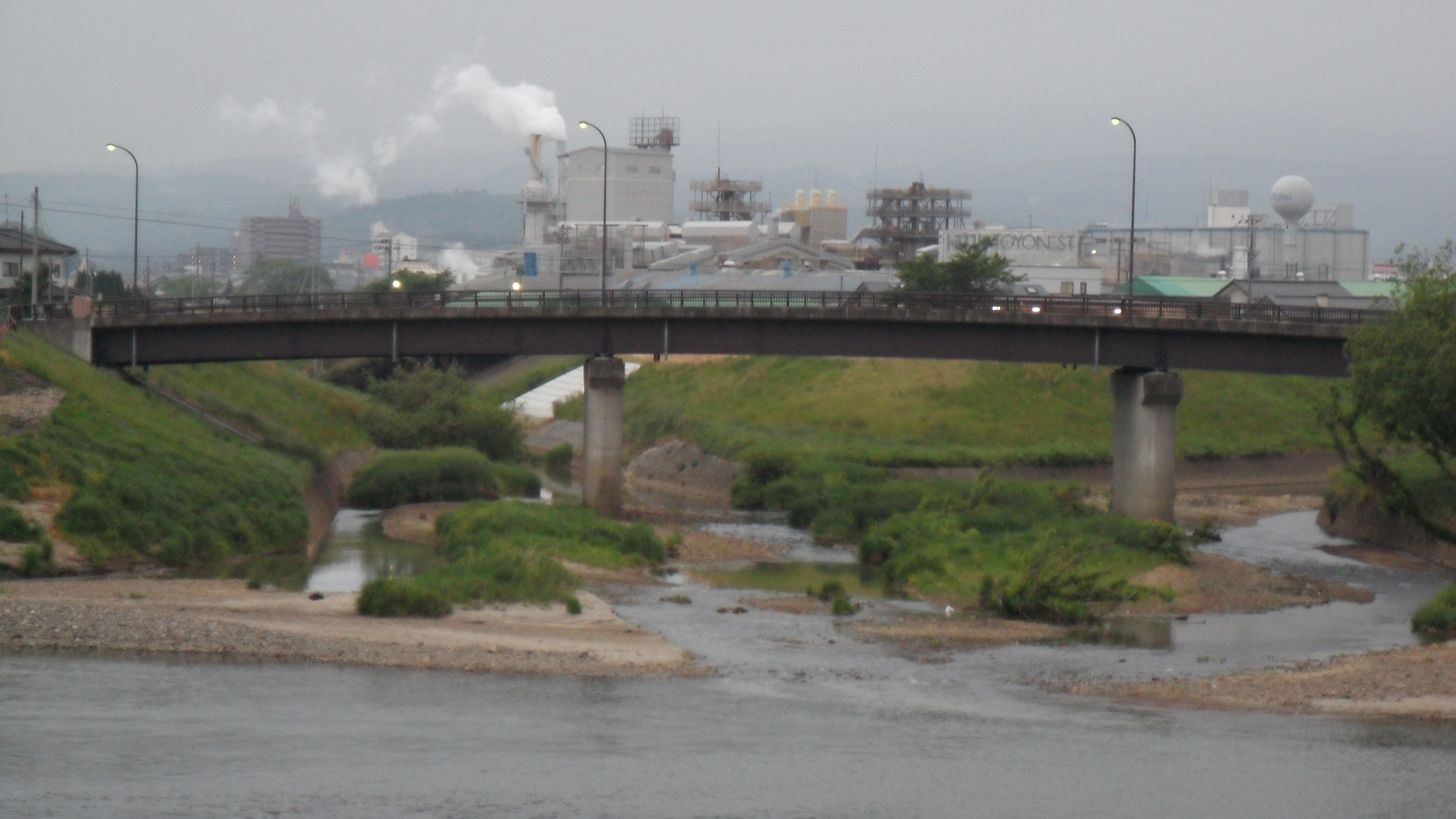 鳥谷野橋. 濁川と大森川が阿武隈川に合流.